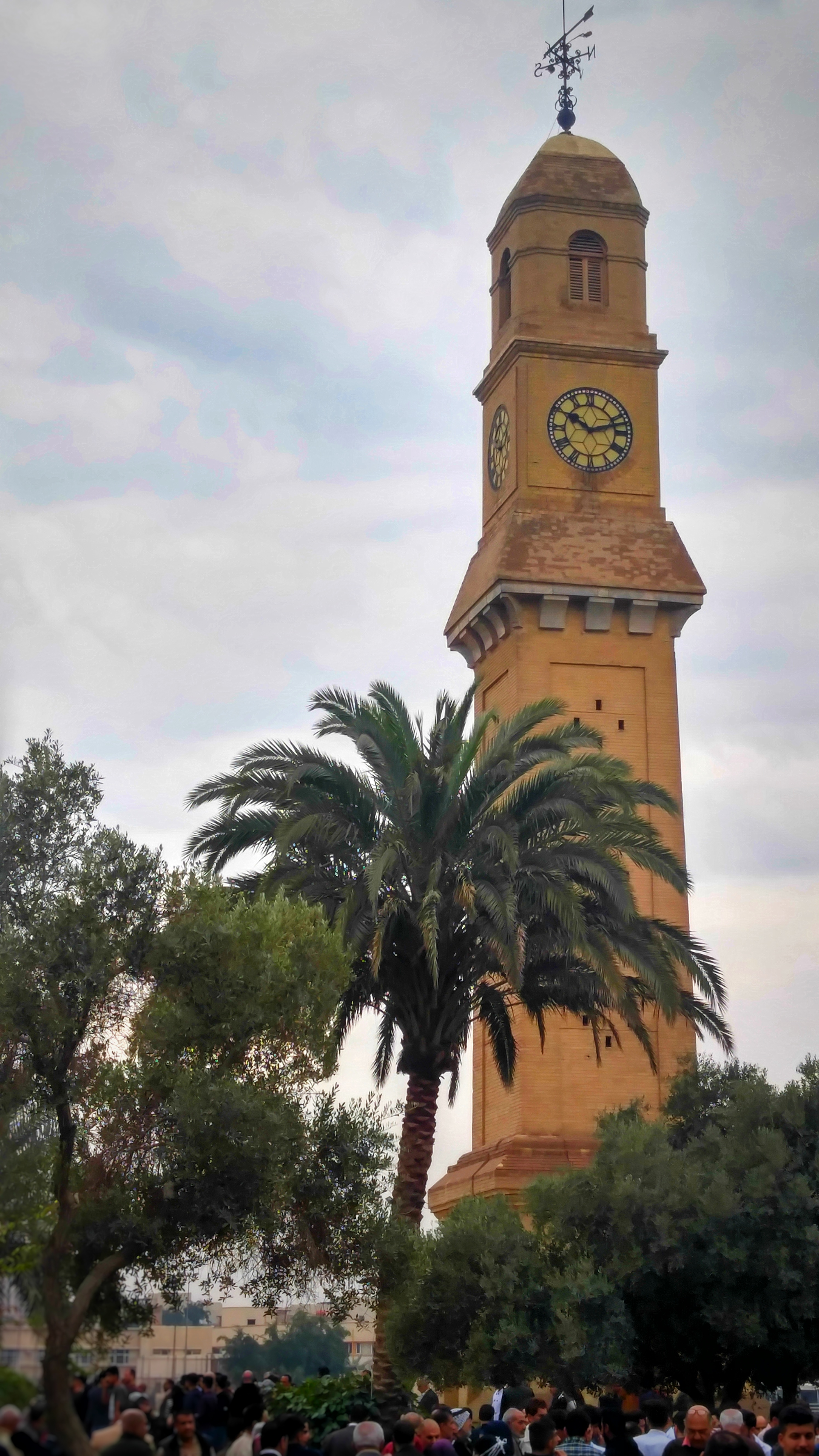 بغداد ، المتنبي ، ساعة القشلة العثمانية الأثرية